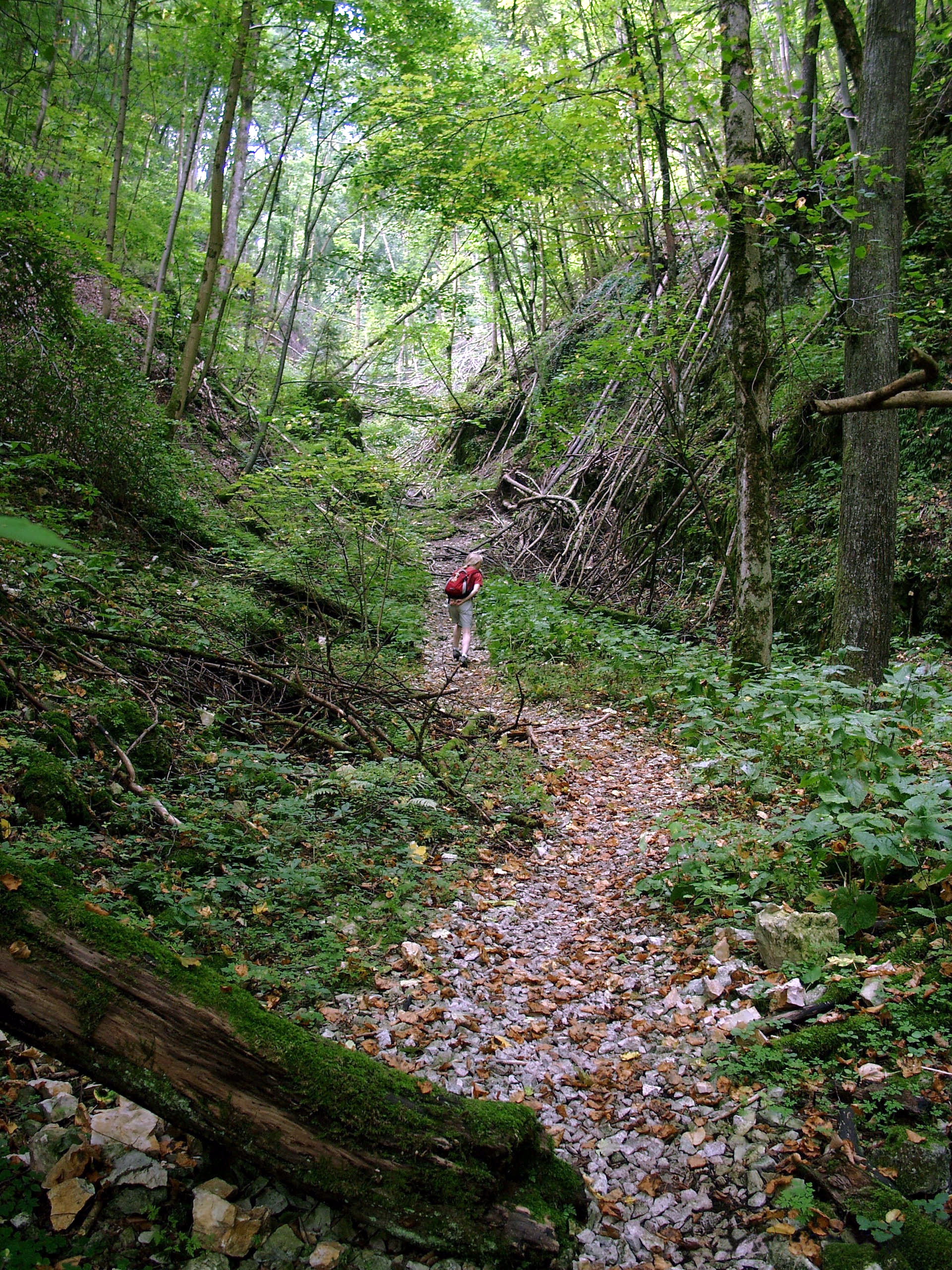 Im Bannwald nahe der Quelle der Lauter